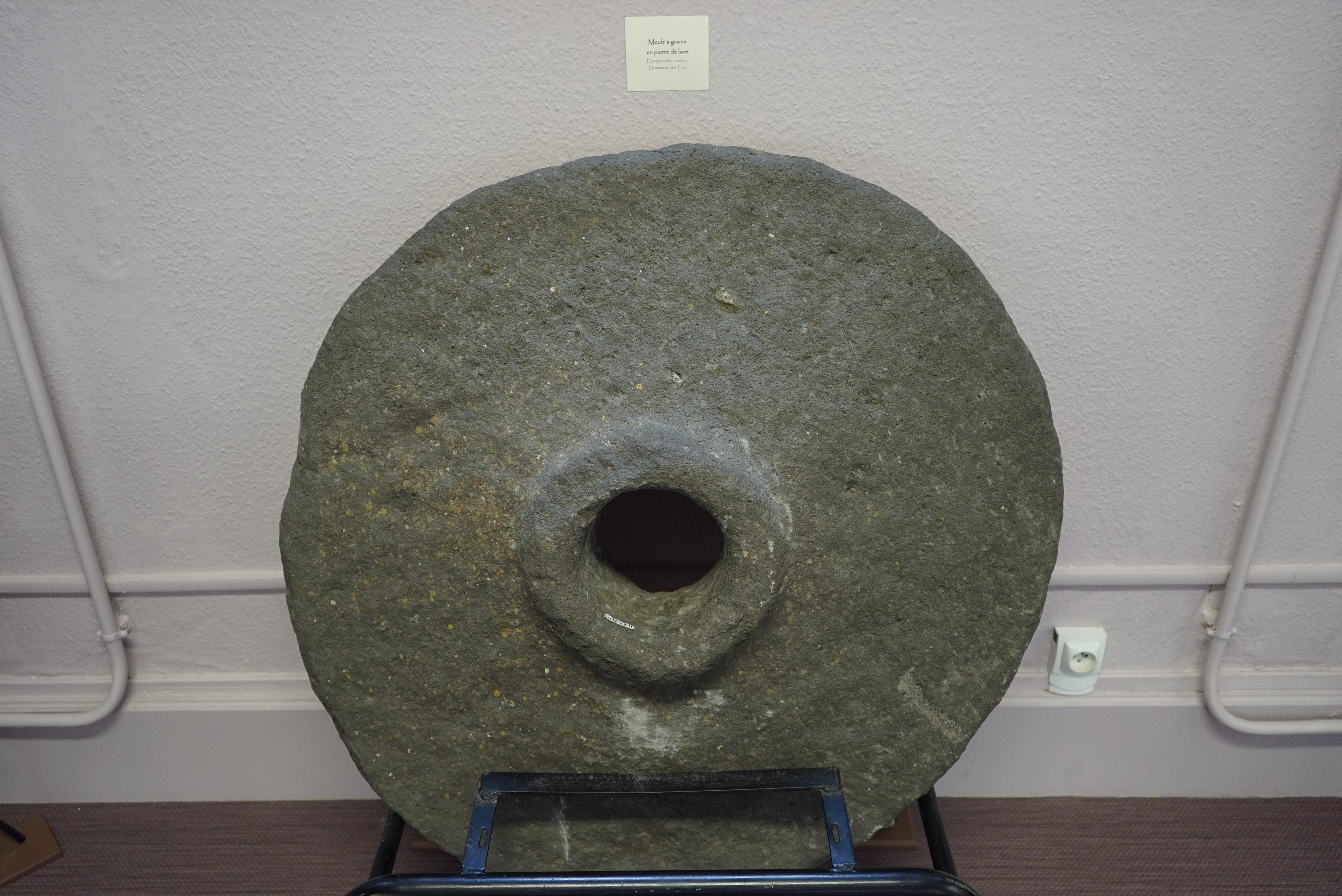 présent au musée de Toul.